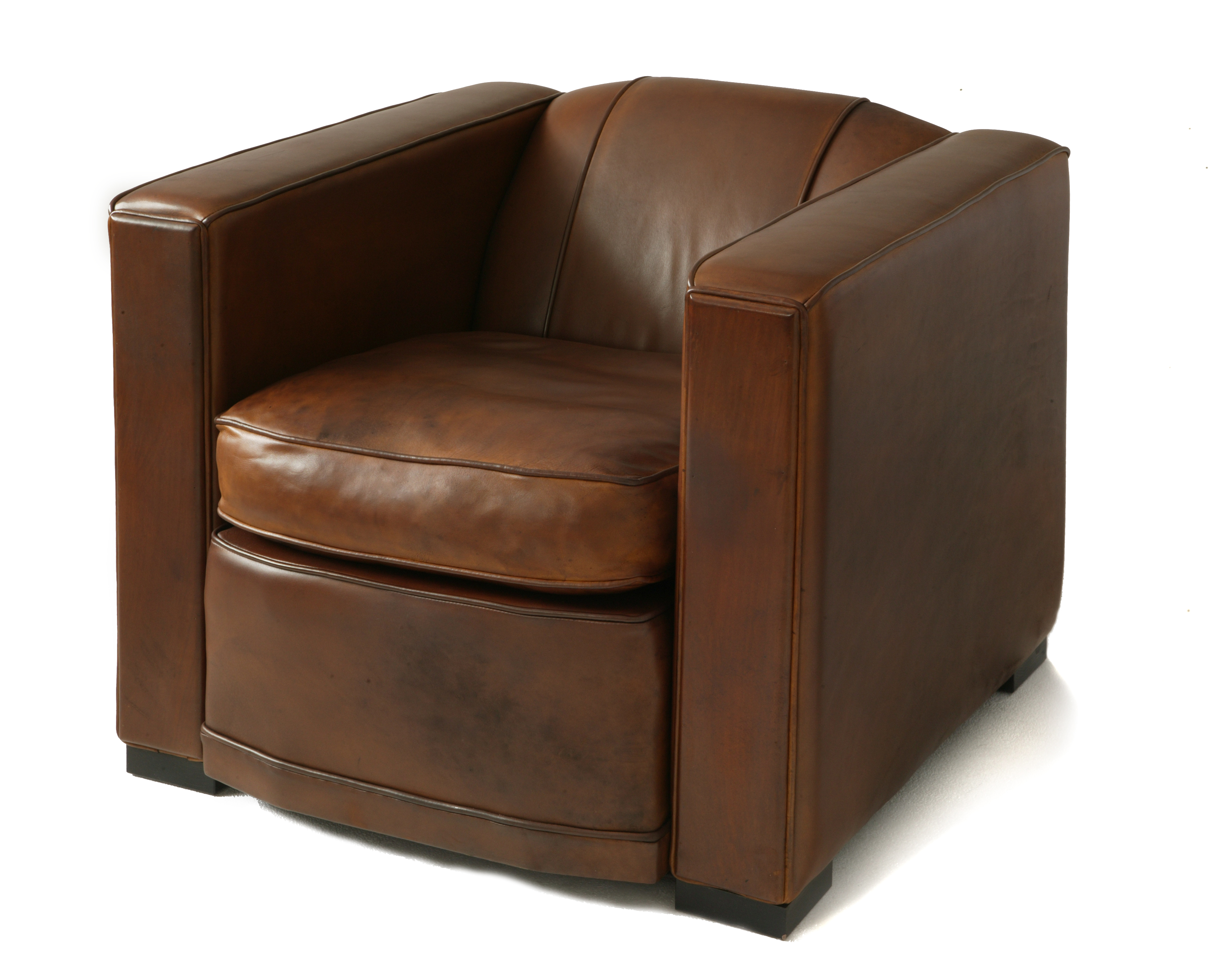 Foto eines typischen ART DECO Clubsessels. Die kubische Form war grundlegendes Kennzeichen dieser Epoche.